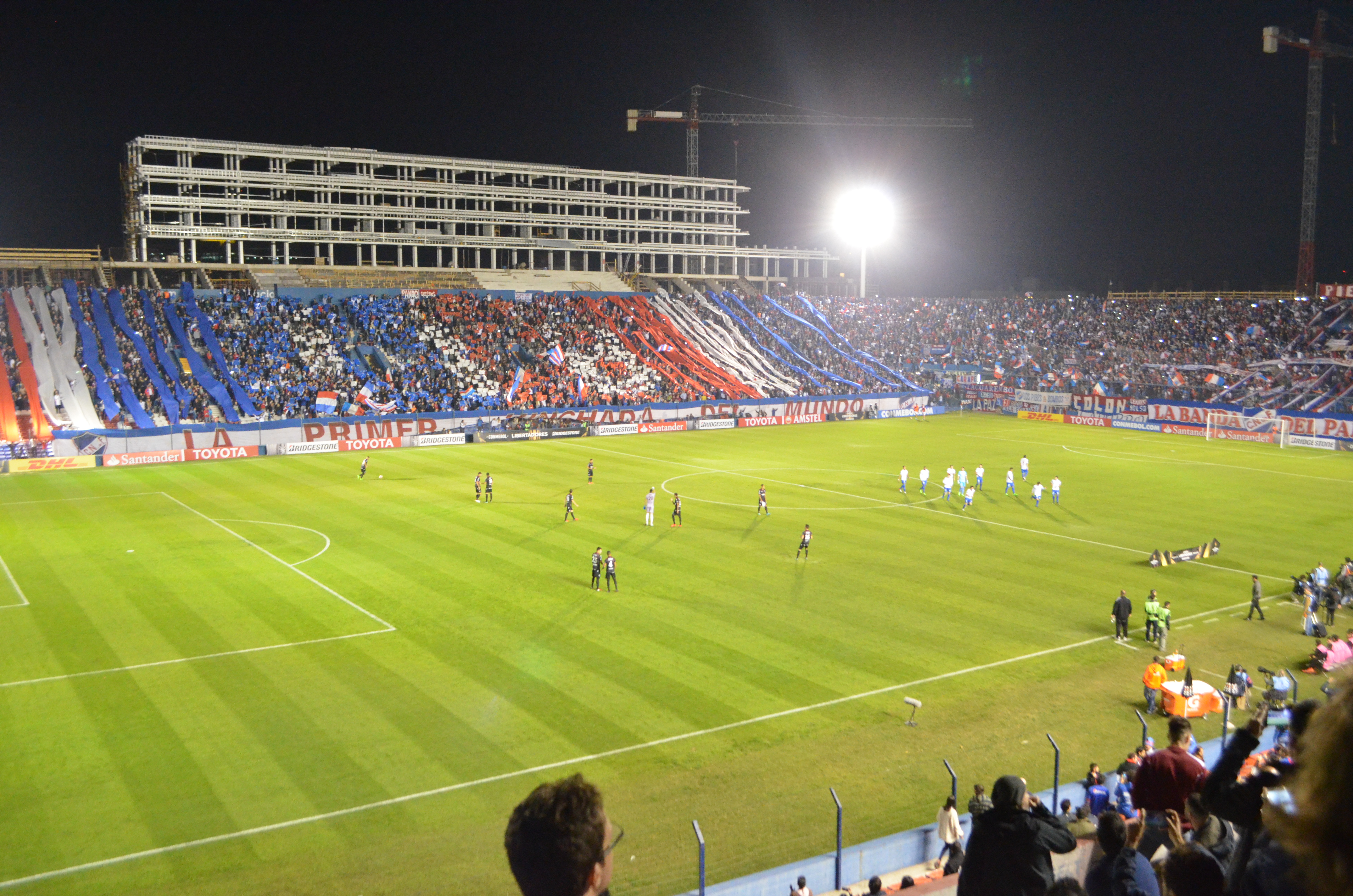 Imagen del partido disputado entre Nacional y Lanús, en el estadio Gran Parque Central, por la fase de grupos de la Copa Conmebol Libertadores 2016